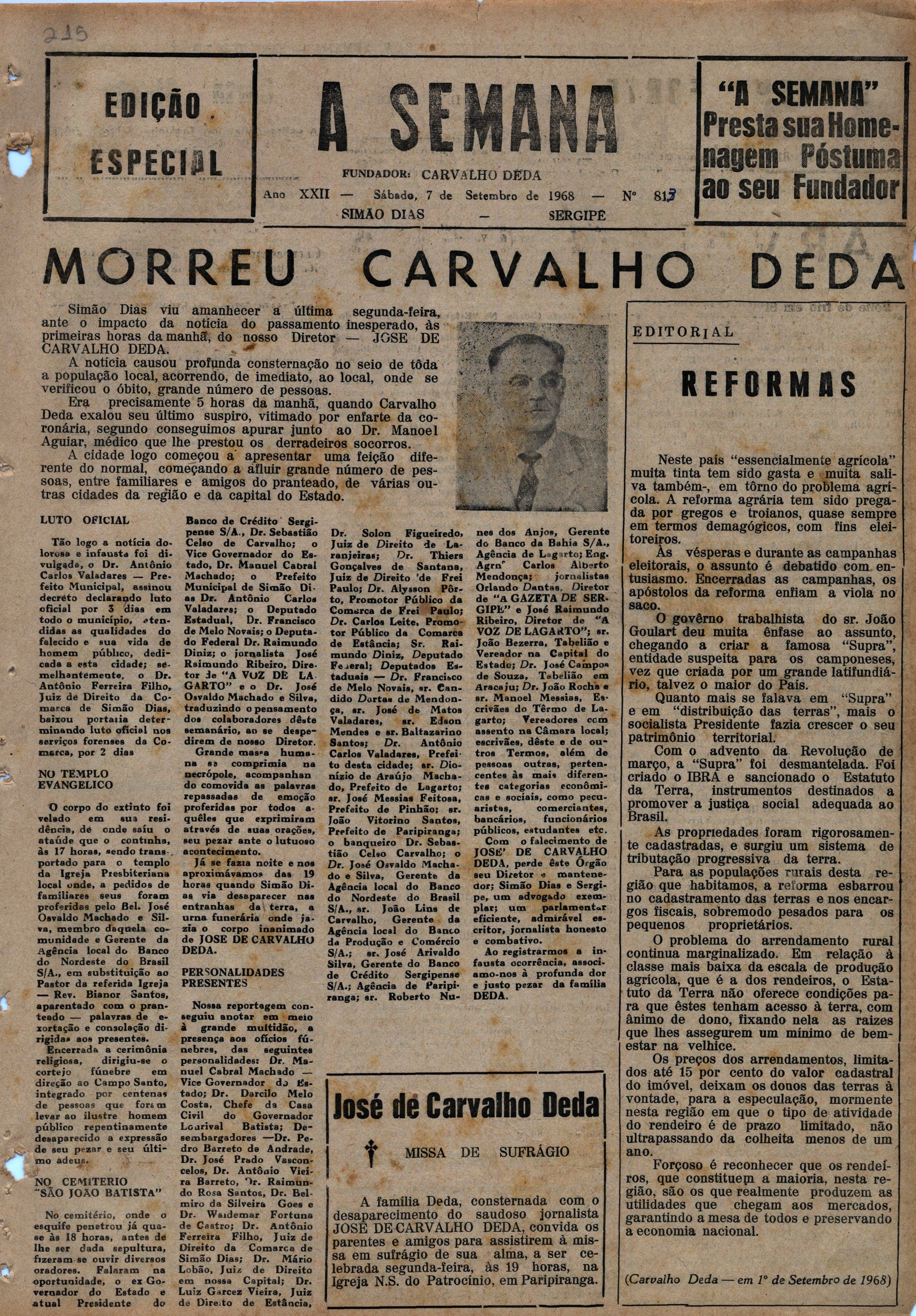 Edição Especial do jornal A Semana, em homenagem ao falecido fundador, publicado na cidade de Simão Dias, Estado de Sergipe, em 07.09.1968.